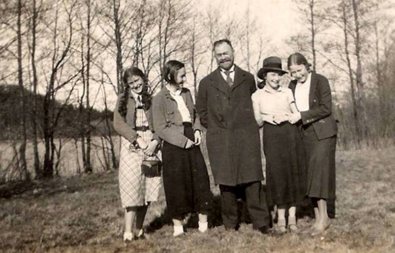 Leo Levy z córkami, lata 30-te